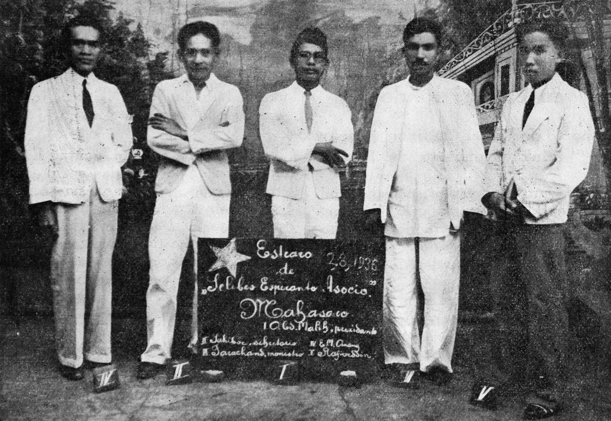 Originala priskribo: En Makassar (Nederlanda Orienta Hindujo), dank’ al la iniciato de s-ano Servius Mamesah, estas fondita Selebesa Esperanto-Asocio, kies estraron montras nia kliŝo: I. Abdul Malik, prezidanto; II. Sahibu, sekretario; III. Tarachand, kasisto; IV. E. M. Anang; kaj V. Rafiuddin, estraranoj. — S-ro Tarachand estas brithindujano, kiu tre aktive kunlaboras kun la indonezianoj por la disvastigo kaj propagando de Esperanto inter sianacianoj en Makassar. Ĝenerale, Selebesa Esperanto-Asocio akceptas kiel membrojn anojn de ĉiuj rasoj, naciecoj aŭ religioj. SEA aliĝas al la universala organizo esperantista. En kelkaj indoneziaj ĵurnaloj jam aperis la statuto de SEA, en malaja lingvo, kaj artikoloj pri la asocio kaj pri Esperanto. Ni deziras al la nova Asocio bonan prosperon kaj longan vivon.